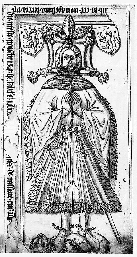 Tekening van het grafmonument voor Walram IV van Nassau-Wiesbaden